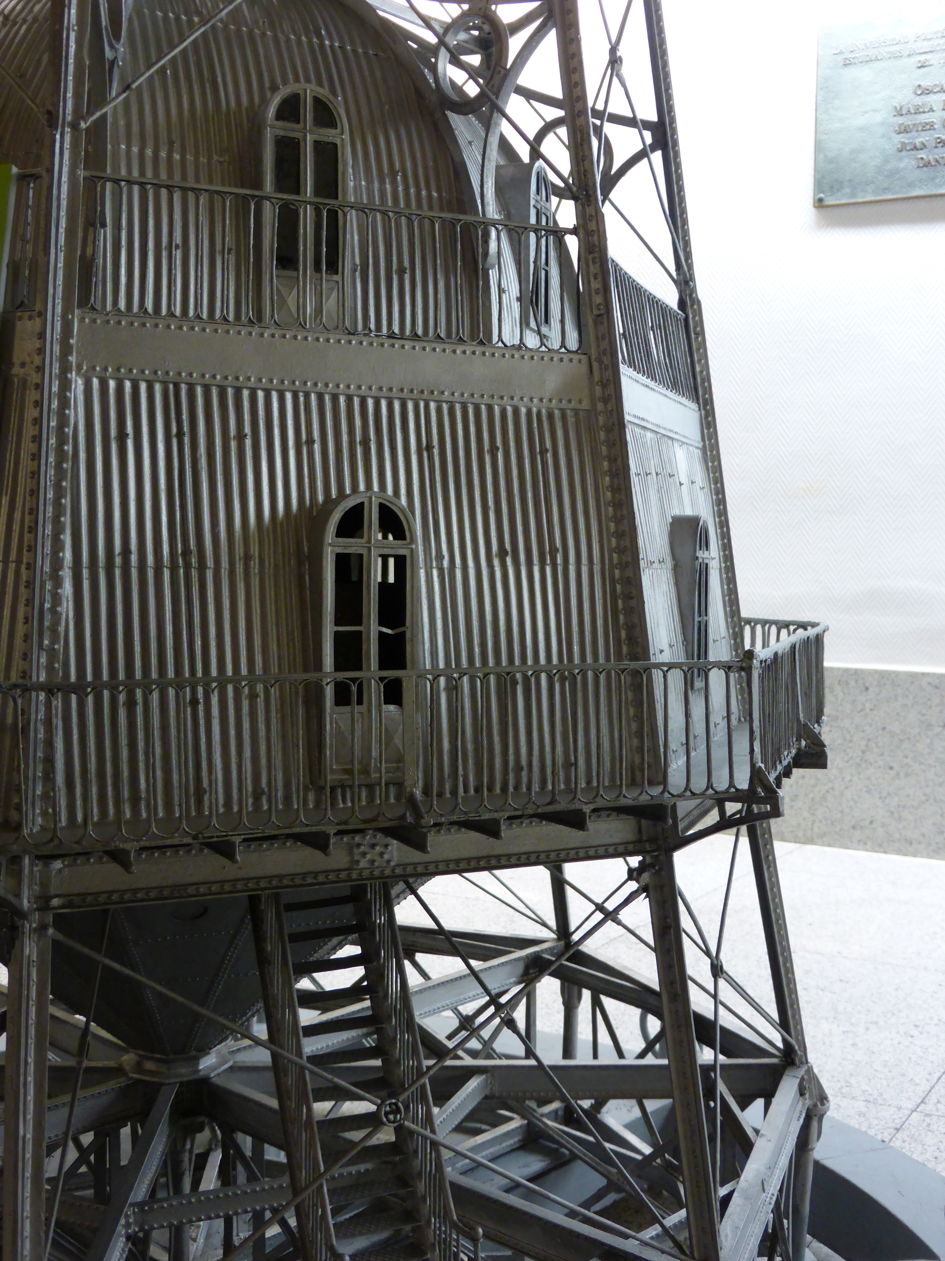 El antiguo Faro de Buda, del delta del Ebro, en la provincia de Tarragona, fue construido en hierro en el año 1864, según diseño del arquitecto e ingeniero español Lucio del Valle y Arana (1815-1874). Se mantuvo en pie casi 100 años, hasta que fue destruido por un temporal en 1961. El grandioso faro, que tenía 53 metros de altura, estaba levantado en un banco de arena, en un lugar despoblado. Para que la gente pudiese hacerse idea de su aspecto, se encargó una maqueta -también en hierro- que lo representase exactamente, aunque con una reducción a su vigésima parte (un 5% de la altura del faro original). Esta maqueta se construyó en Barcelona y en el verano de 1867 se presentó en la Exposición Universal de París. Dicha maqueta antigua, de 1867, se ha conservado en la Universidad Politécnica de Madrid. En la fotografía vemos un detalle de la parte baja, que servía de alojamiento a los fareros o torreros.